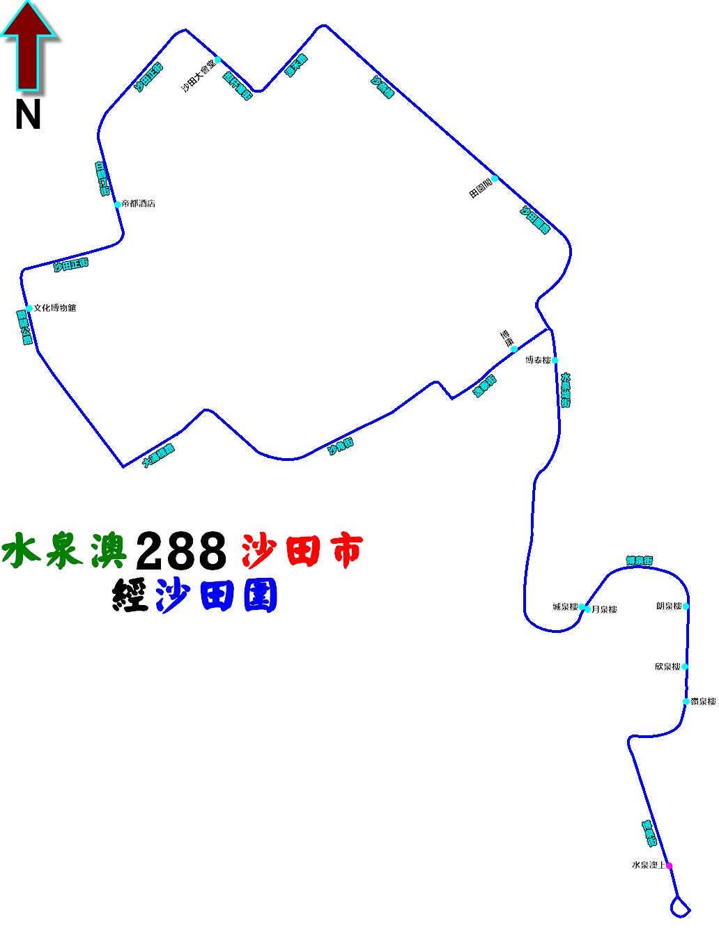 中文（香港）: 九巴288線的走線圖